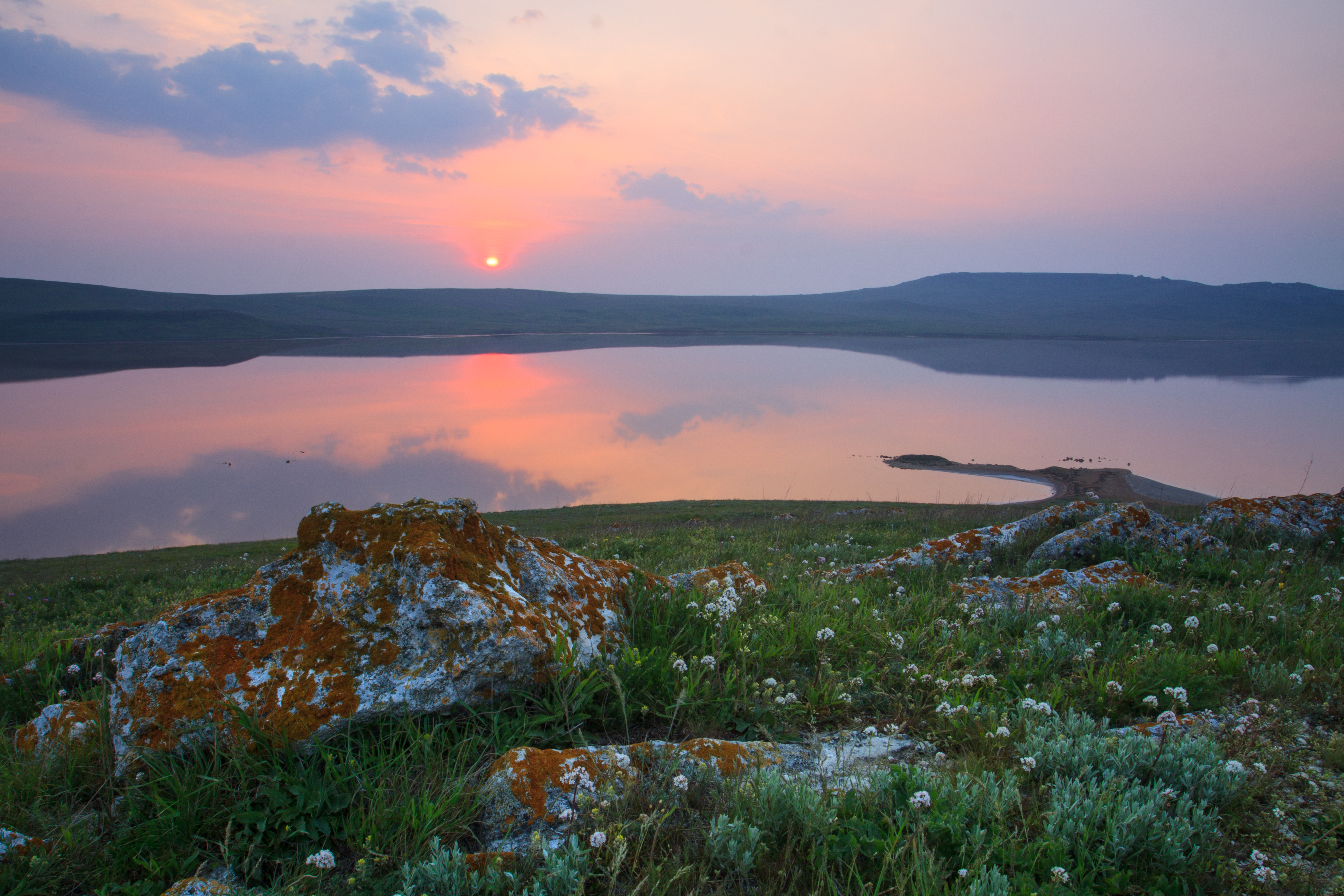 Опукський ПЗ, Ленінський р-н, с. Яковенкове, вул.. Чорноморська, 1а